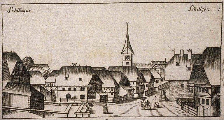 Schillique = Schilligen. Bibliothèque nationale et universitaire de Strasbourg